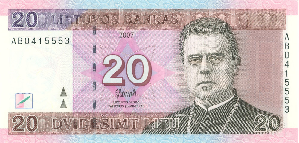 Lithuania 20 litu 2007